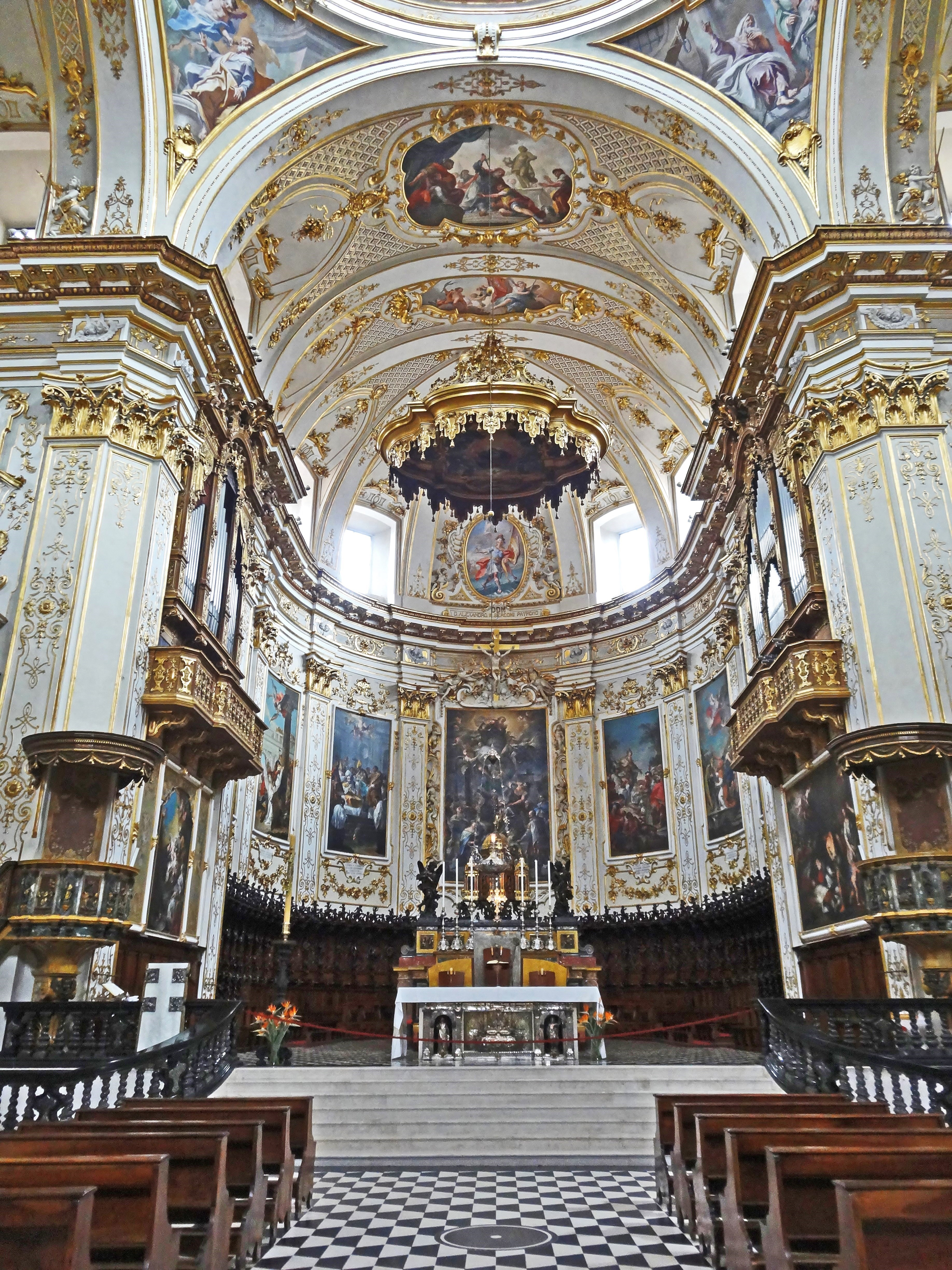 Dom von Bergamo, der Chorraum